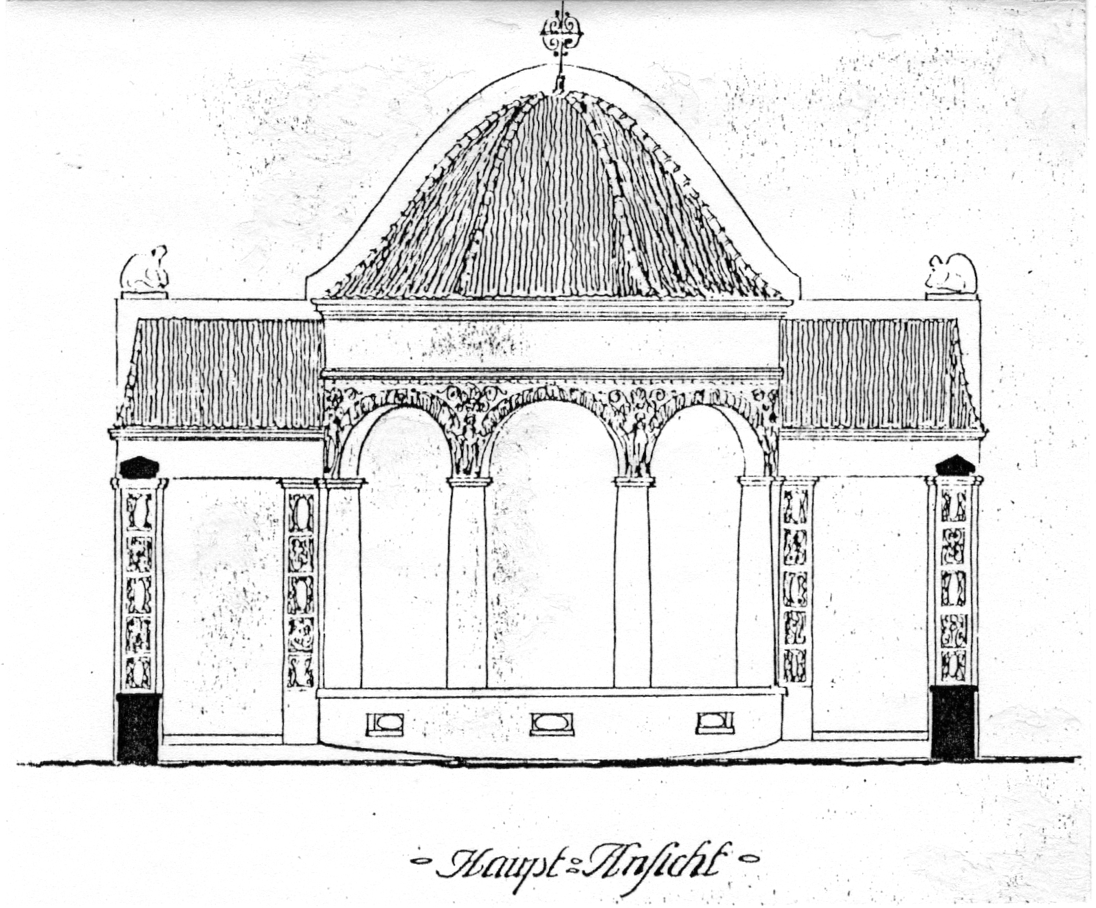 Neubau eines Mausoleums für die Familie Moll in Neumünster